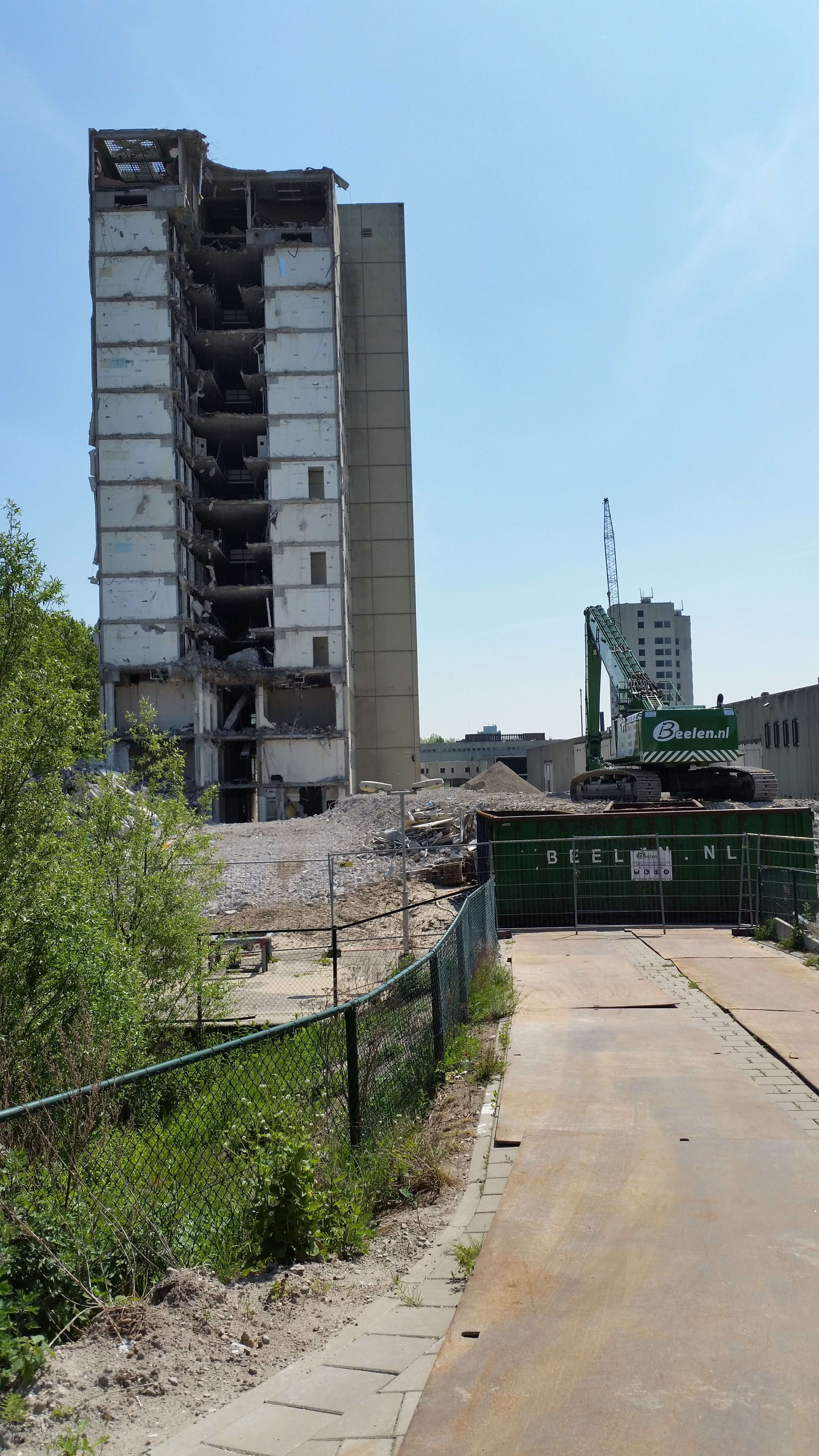 Twee overgebleven torens van de Bijlmerbajes in mei 2020